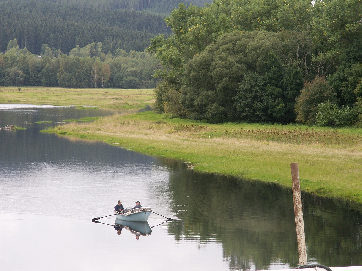 Lipno